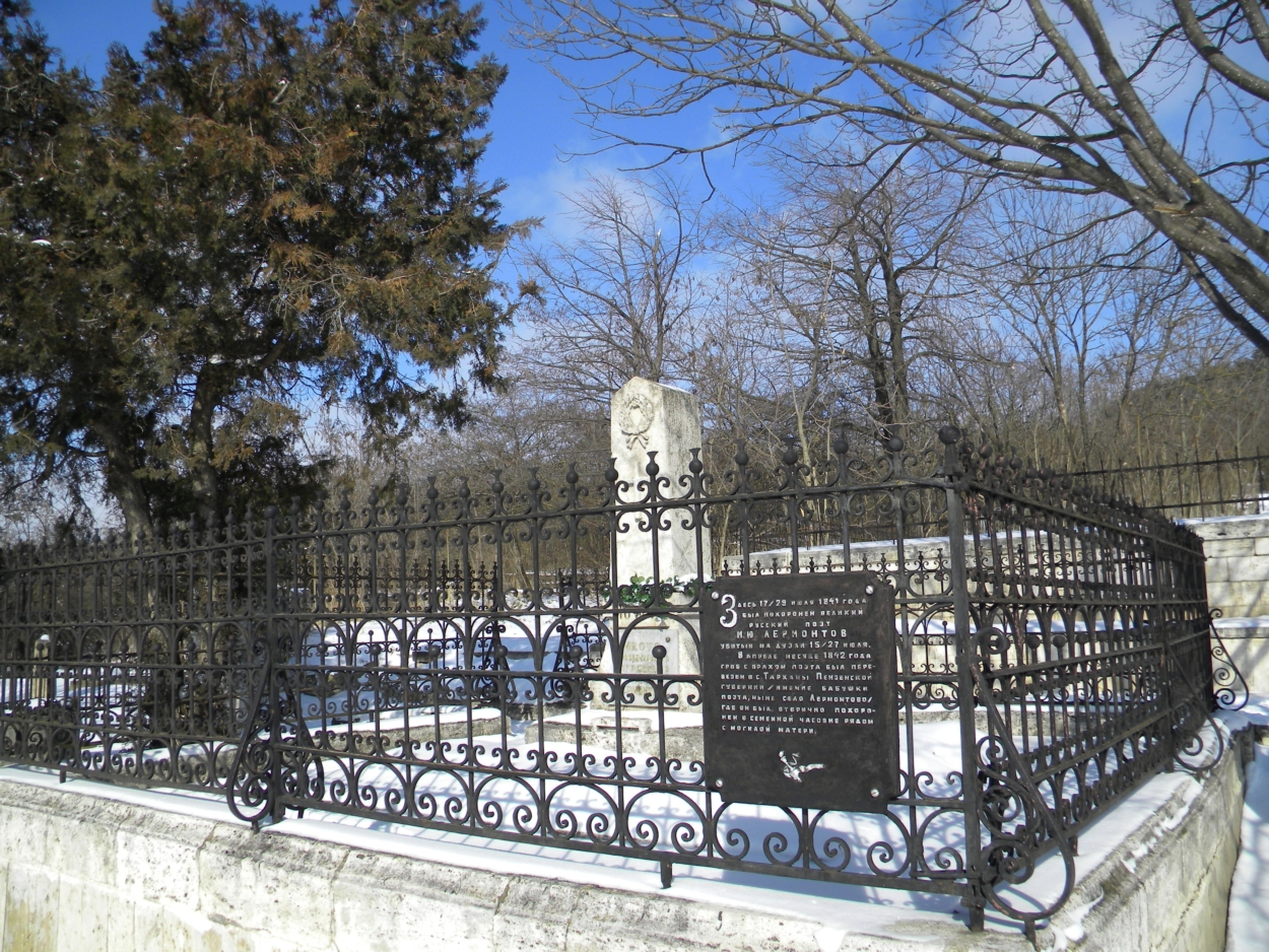 Здесь 17(29) июля 1841 года был похоронен великий русский поэт и писатель Михаил Юрьевич Лермонтов. Спустя несколько месяцев по просьбе его бабушки, прах гения был эксгумирован и перезахоронен в фамильном склепе в имении Тарханы Пензенской губернии.